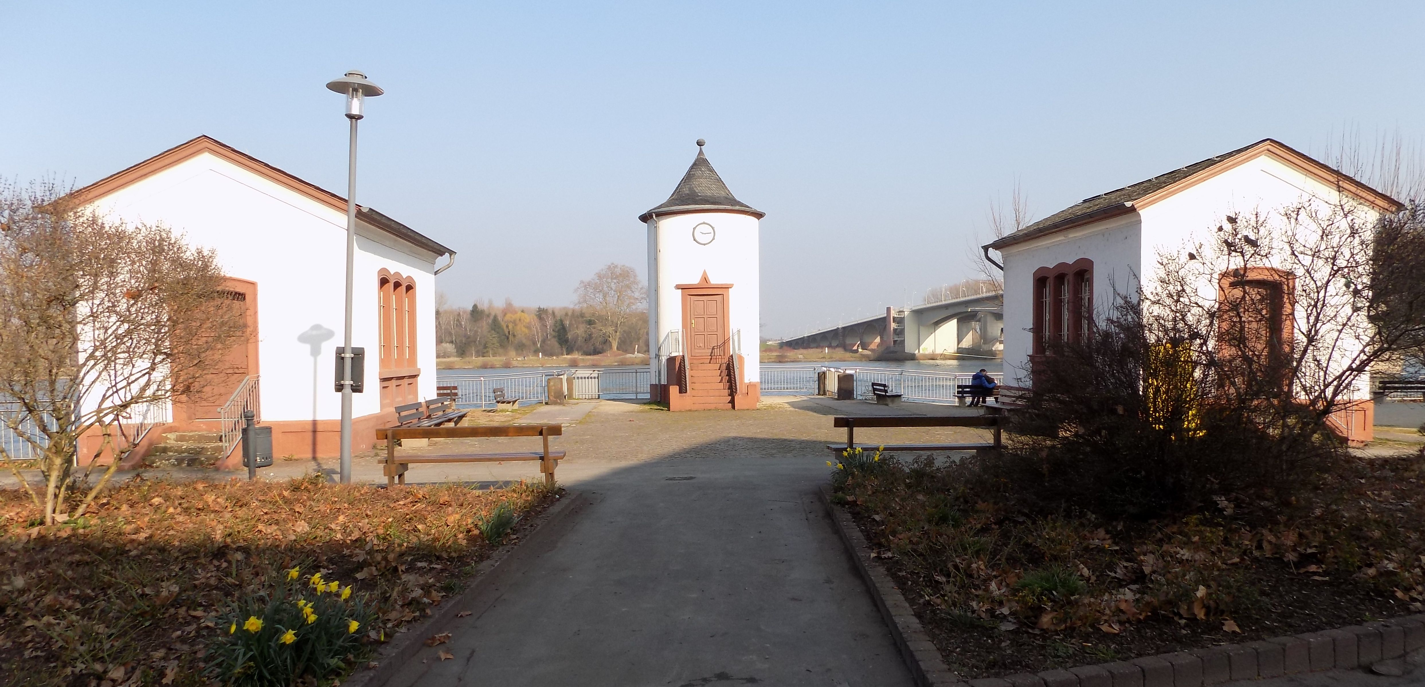 Bauensemble Pegelhaus Worms